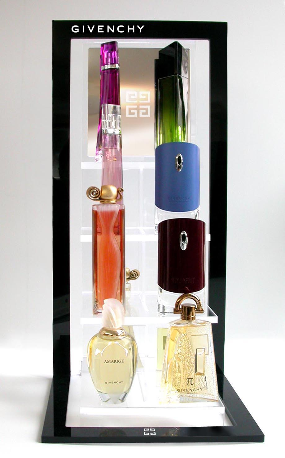 PLV: présentoir multifragrances